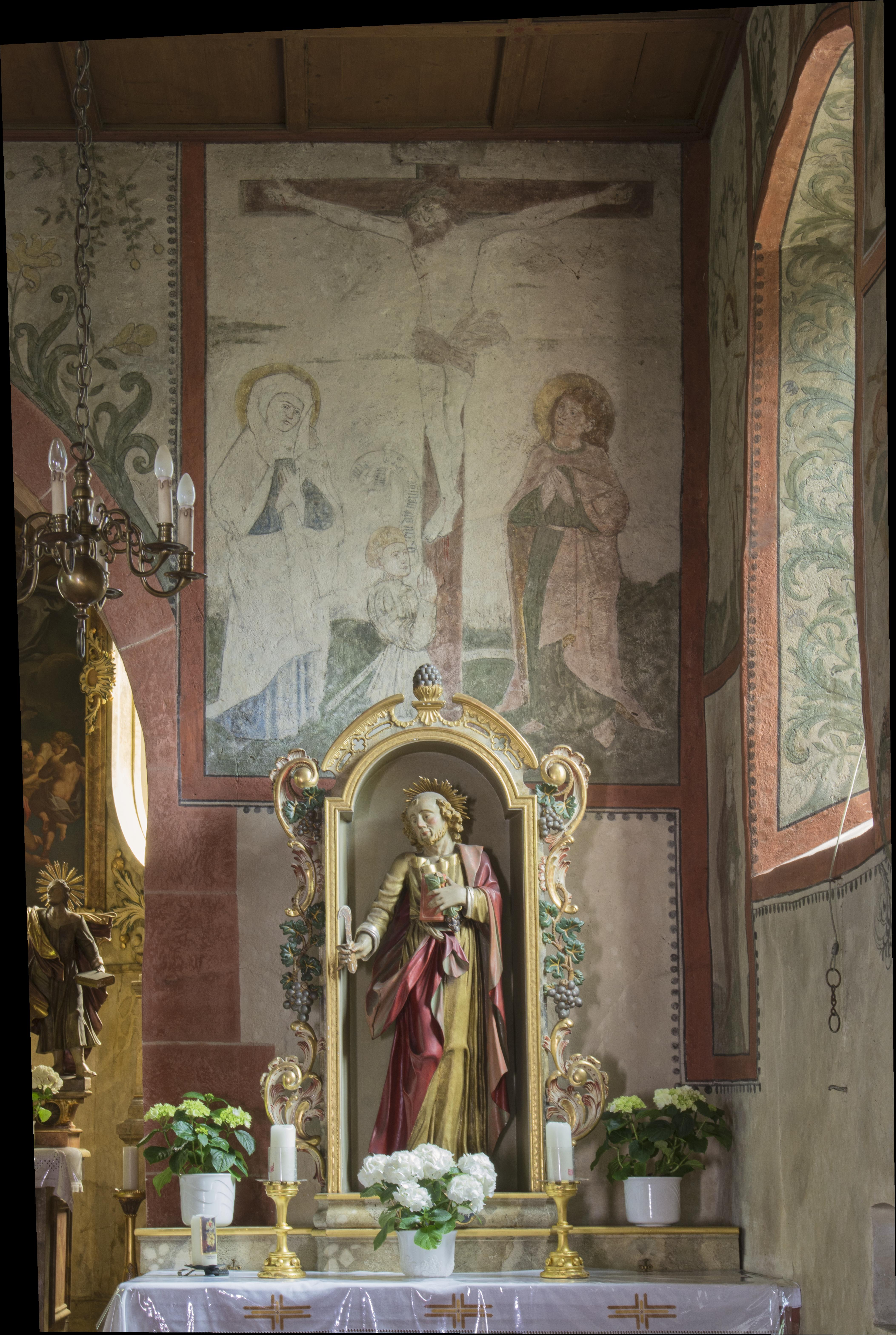 Bilder von der Bühlwegkapelle in Ortenberg